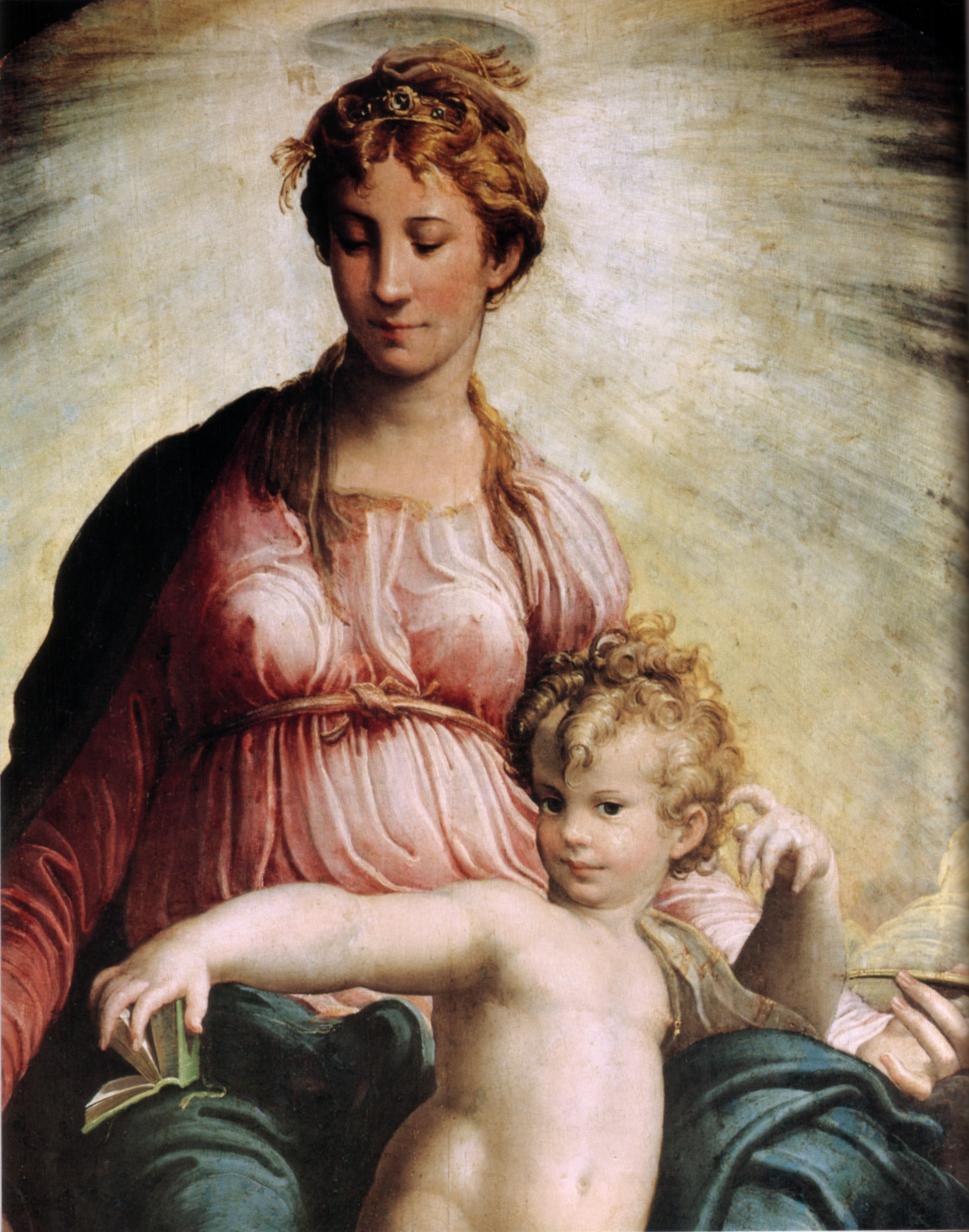 detail